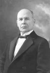 Albert Gigaire (1872-1959). Il fut le maire de Shawinigan Falls (Québec) de 1930 à 1936.